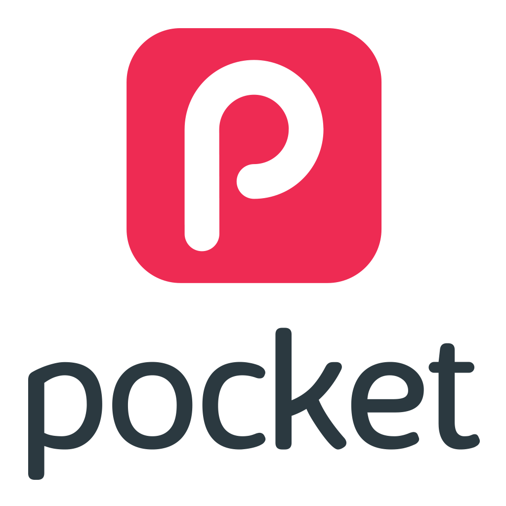 Монгол: Pocket үндсэн лого